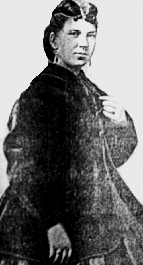 Portrait de la chanteuse française d'origine stéphanoise Augustine Kaiser dont la carrière dura de 1854 à au moins le début des années 1880.